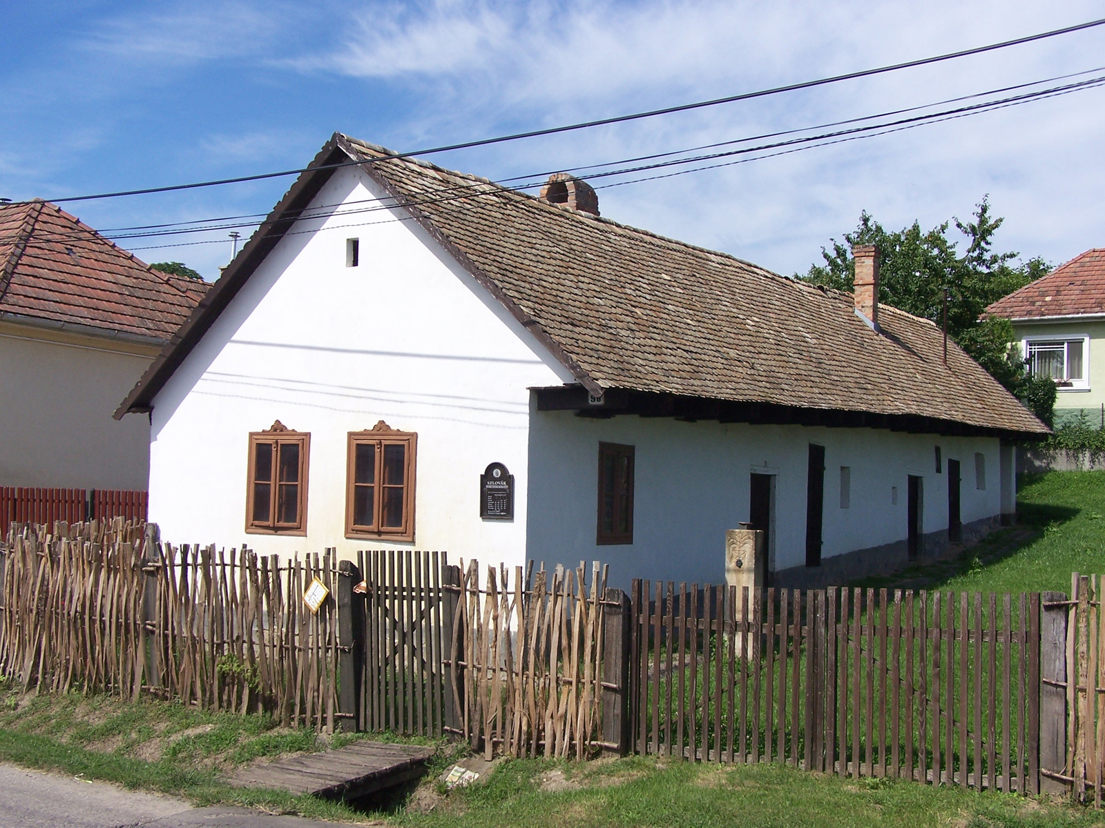 Lakóház (Szlovák tájház) (Bánk, Petőfi Sándor utca 98 .) This is a photo of a monument in Hungary. Identifier: 6520